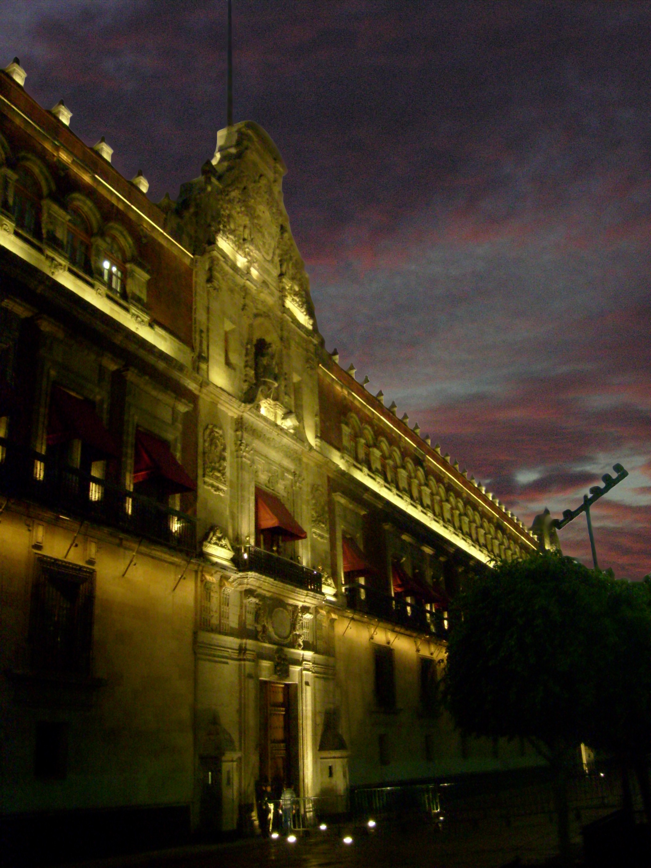 Palacio Nacional en el Centro Histórico de la Ciudad de México, en México.